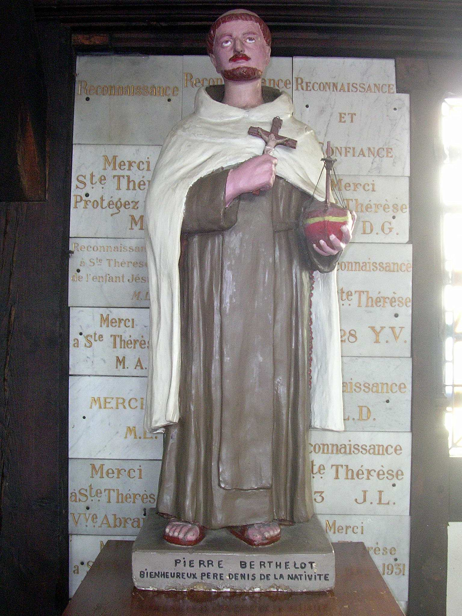 Statue de Pierre Berthelot, alias Denis de la Nativité, dans l'église Sainte-Catherine d'Honfleur